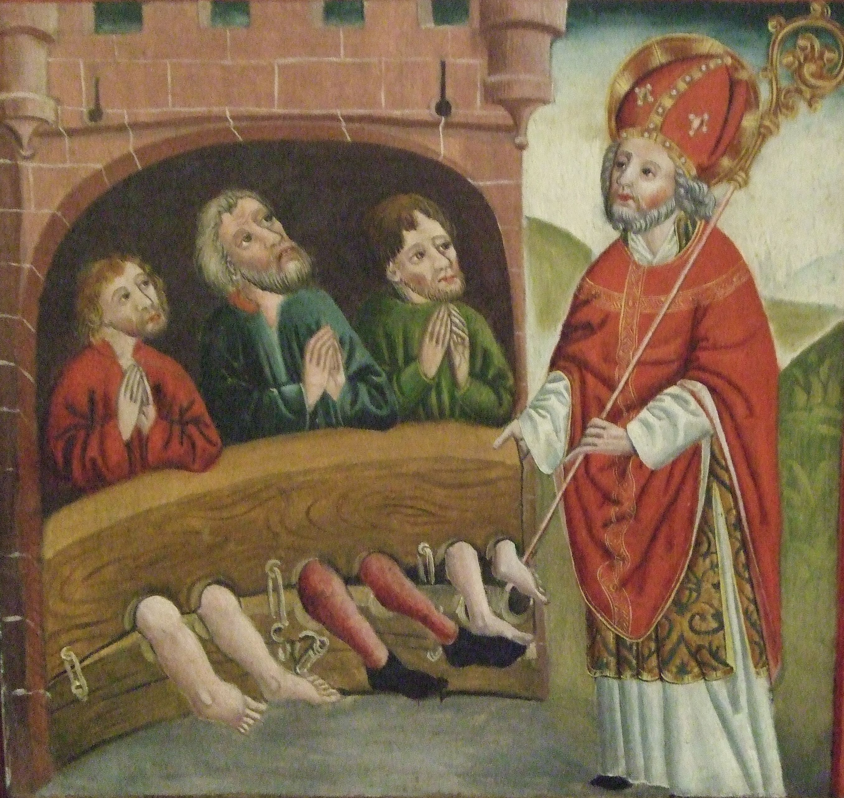 Von einem nicht mehr vollständig erhaltenen Nikolaus-Flügelaltar aus der Zeit um 1485, befinden sich an der Nordwand des Chores in der Kirche St. Mariae in Mühlhausen - Thüringen, die zwei restlichen Seitentafeln, auf denen zwölf Szenen aus dem Leben des Heiligen dargestellt werden.Hier eine Szene mit dem Heiligen Nikolaus, wie er drei Männer befreit, die von Kaiser Konstantin verurteilt wurden und im Block eingeschlossen, aber unschuldig sind.